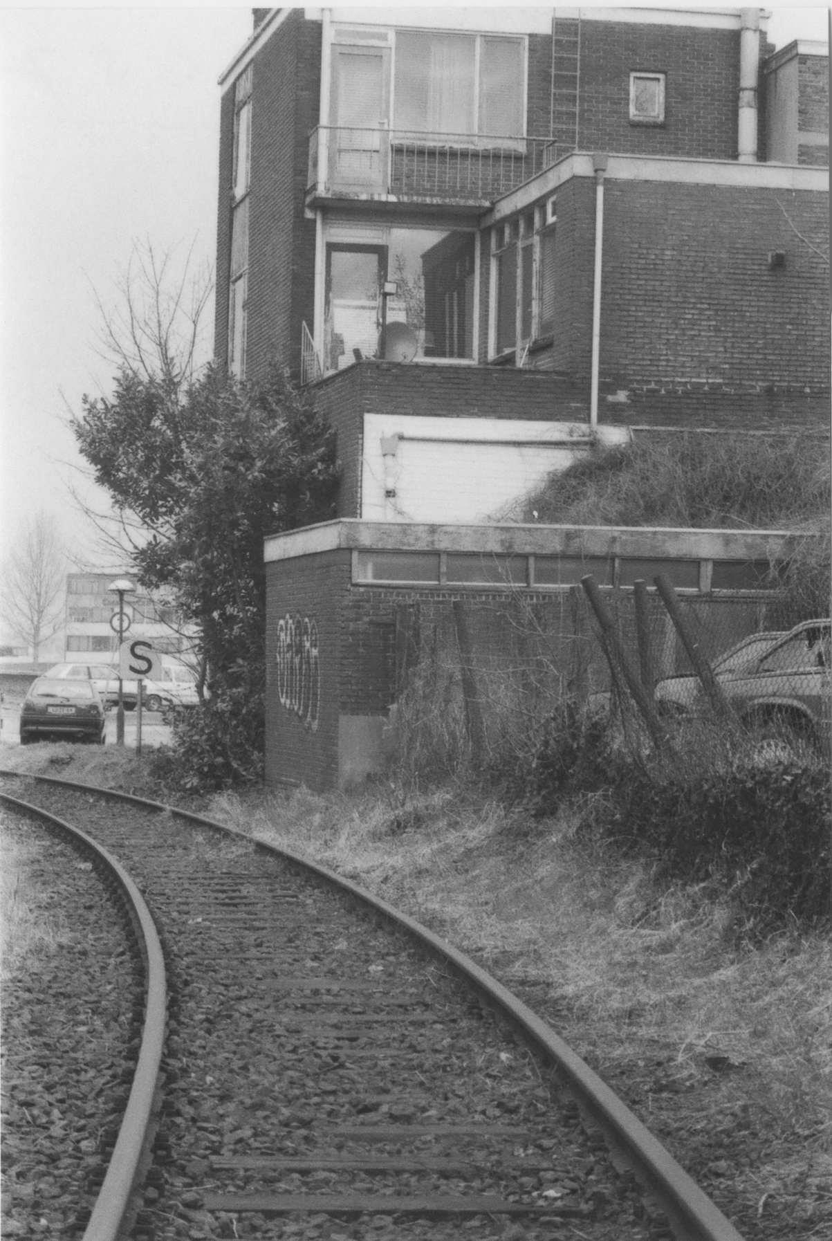 Achterzijde van het pand van Autobedrijf Heijmans uit 1955, met de naastgelegen vooroorlogse woningen nu volledig gesloopt. Op de voorgrond de goederenspoorlijn (stamlijn) naar de Noord- en Oostkanaalhaven. Op de achtergrond, midden links, het kantoorgebouw van Havenweg 15.